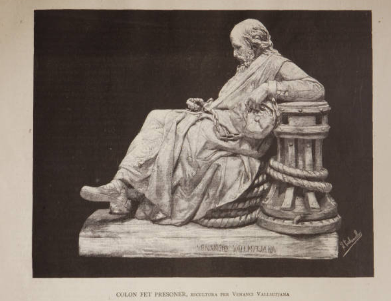 La Ilustració Catalana, número 196 30 Setembre de 1888 pàg. 272